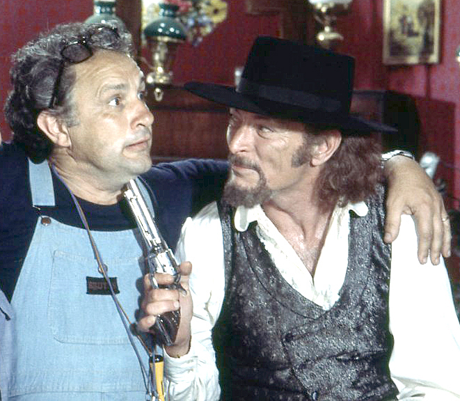 וונדטה לי ואן קליף בסרט